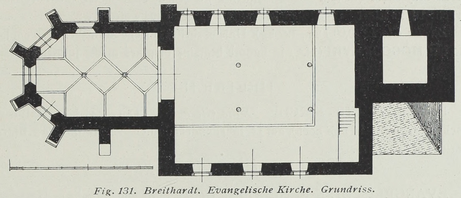 Breithardt evangelische Kirche Grundriss